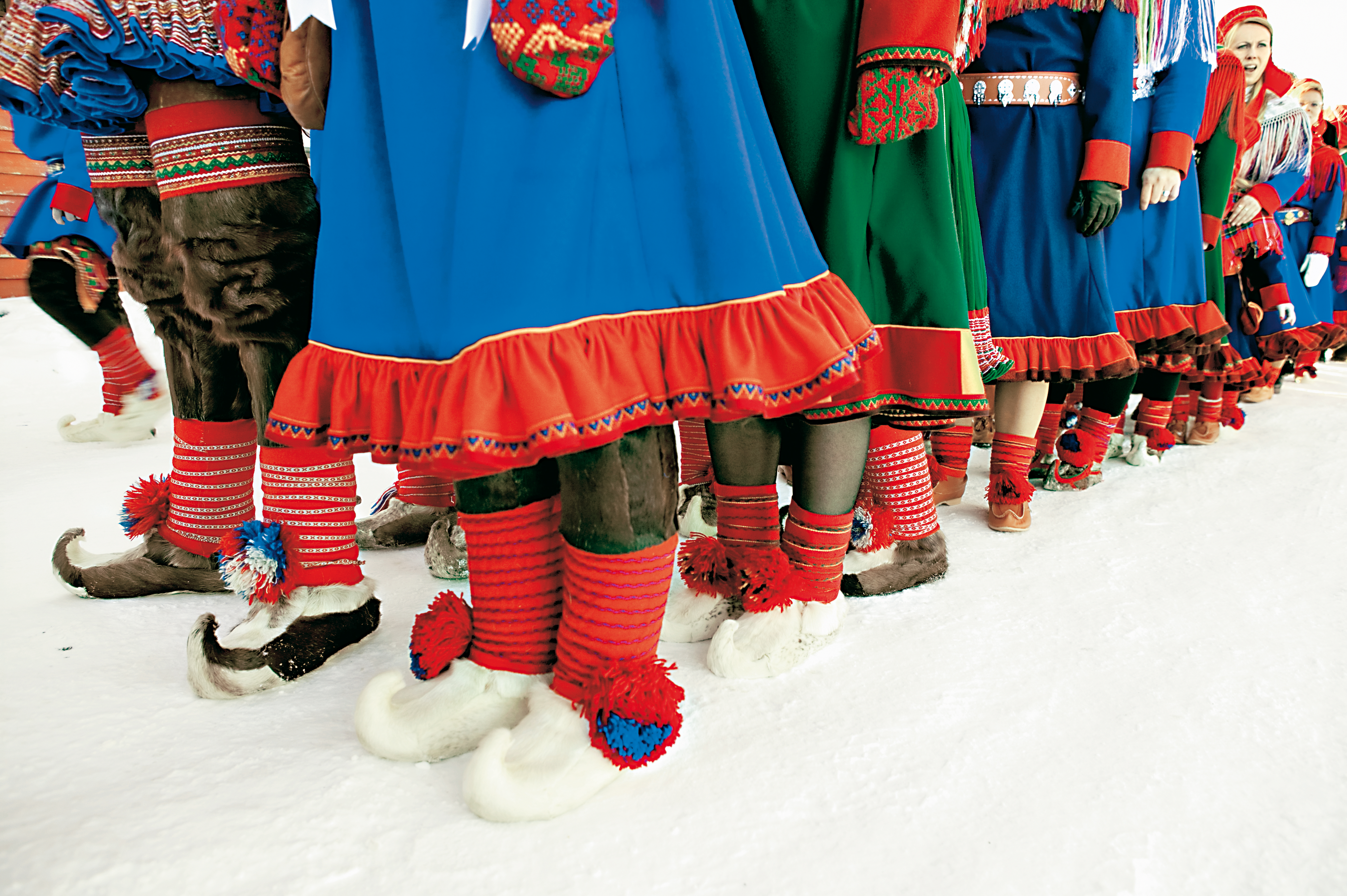 Norske samer